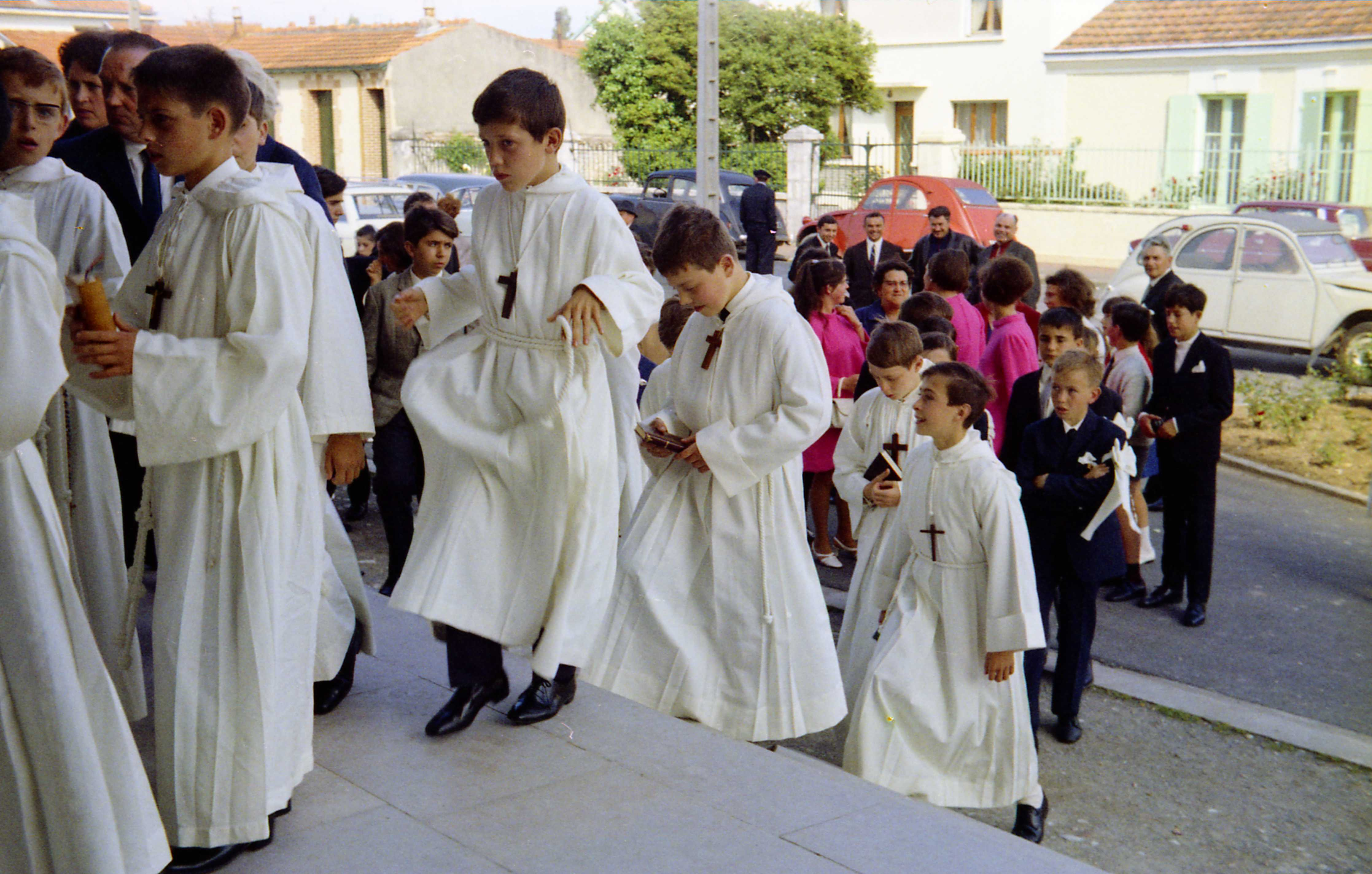 Entrée dans l'église d'enfants effectuant leur communion solennelle. Eglise Sainte Jeanne d'Arc à Fétilly, La Rochelle (France). Juin 1969.